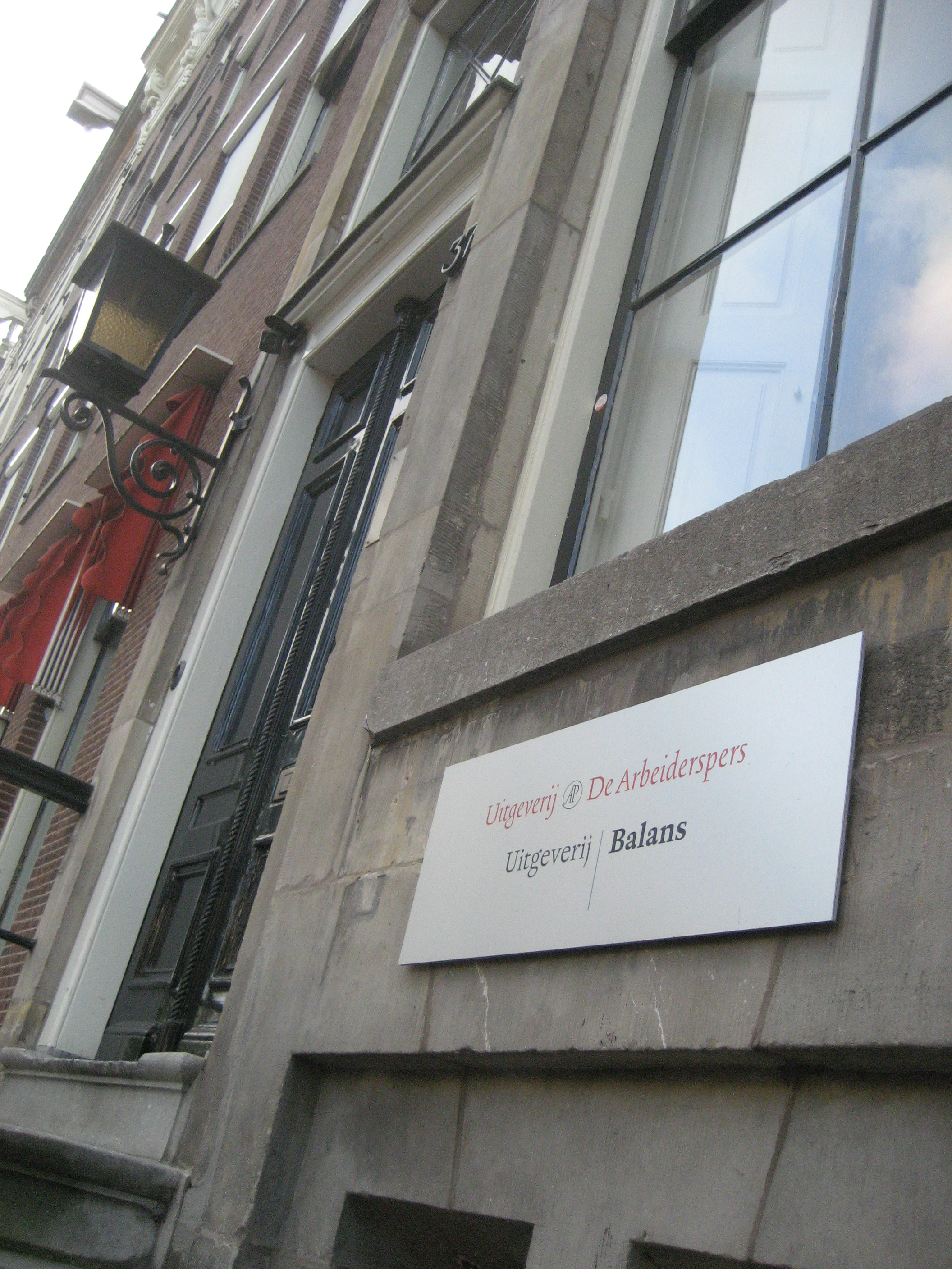 Herengracht 370-372, Amsterdam (Nederland). (Voormalig) kantoor van uitgeverijen Balans en De Arbeiderspers